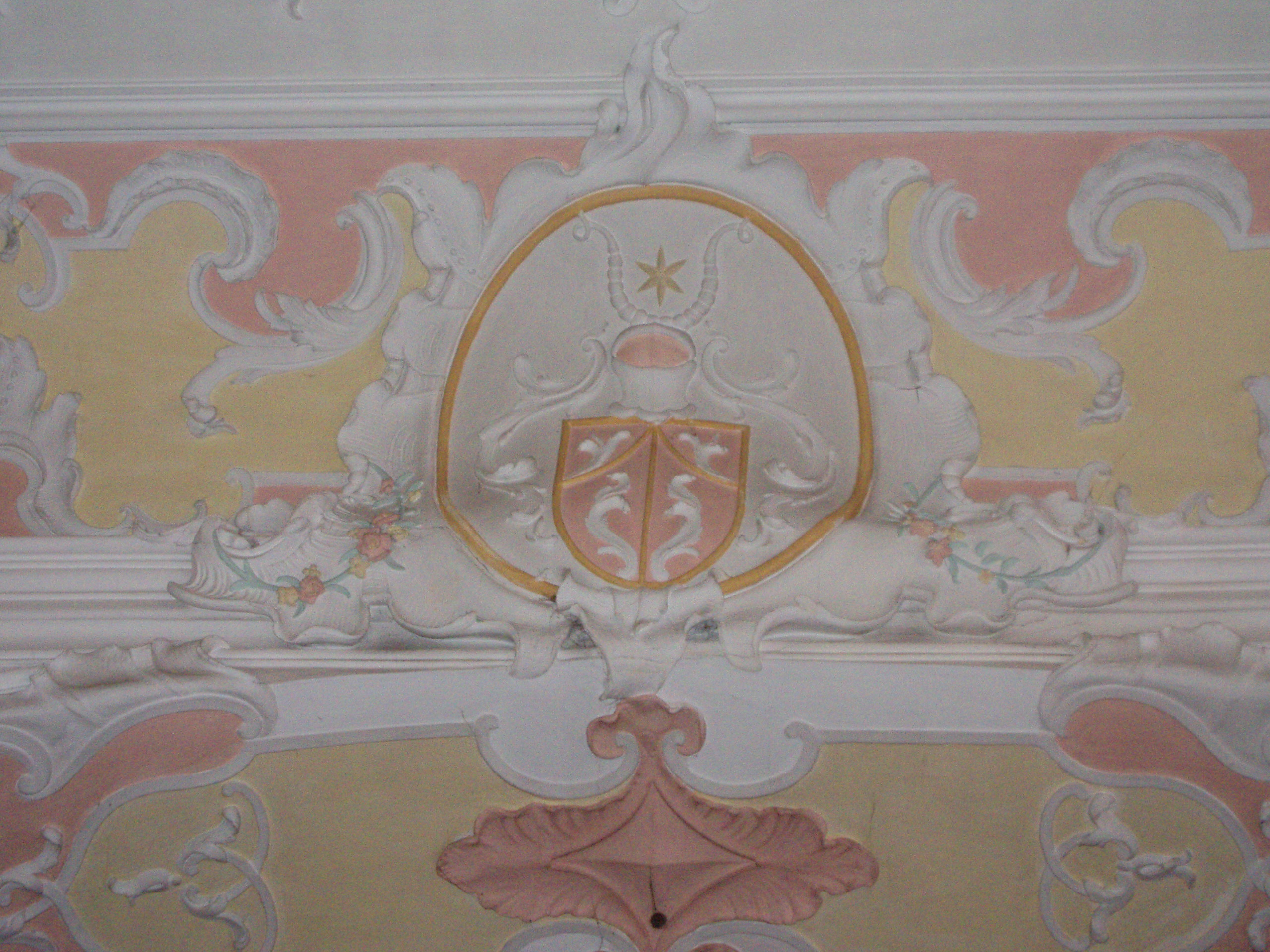 Stuckdetail aus der ev. Kirche in Bad Hindelang von den Brüdern Dornacher aus dem Jahr 1748